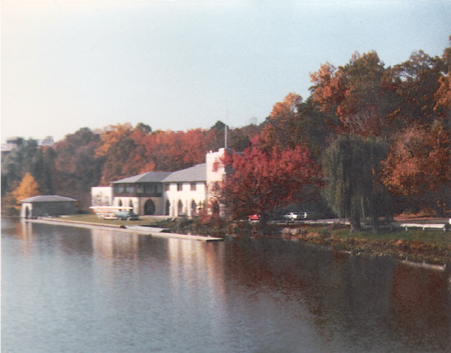 卡內基湖，普林斯頓．